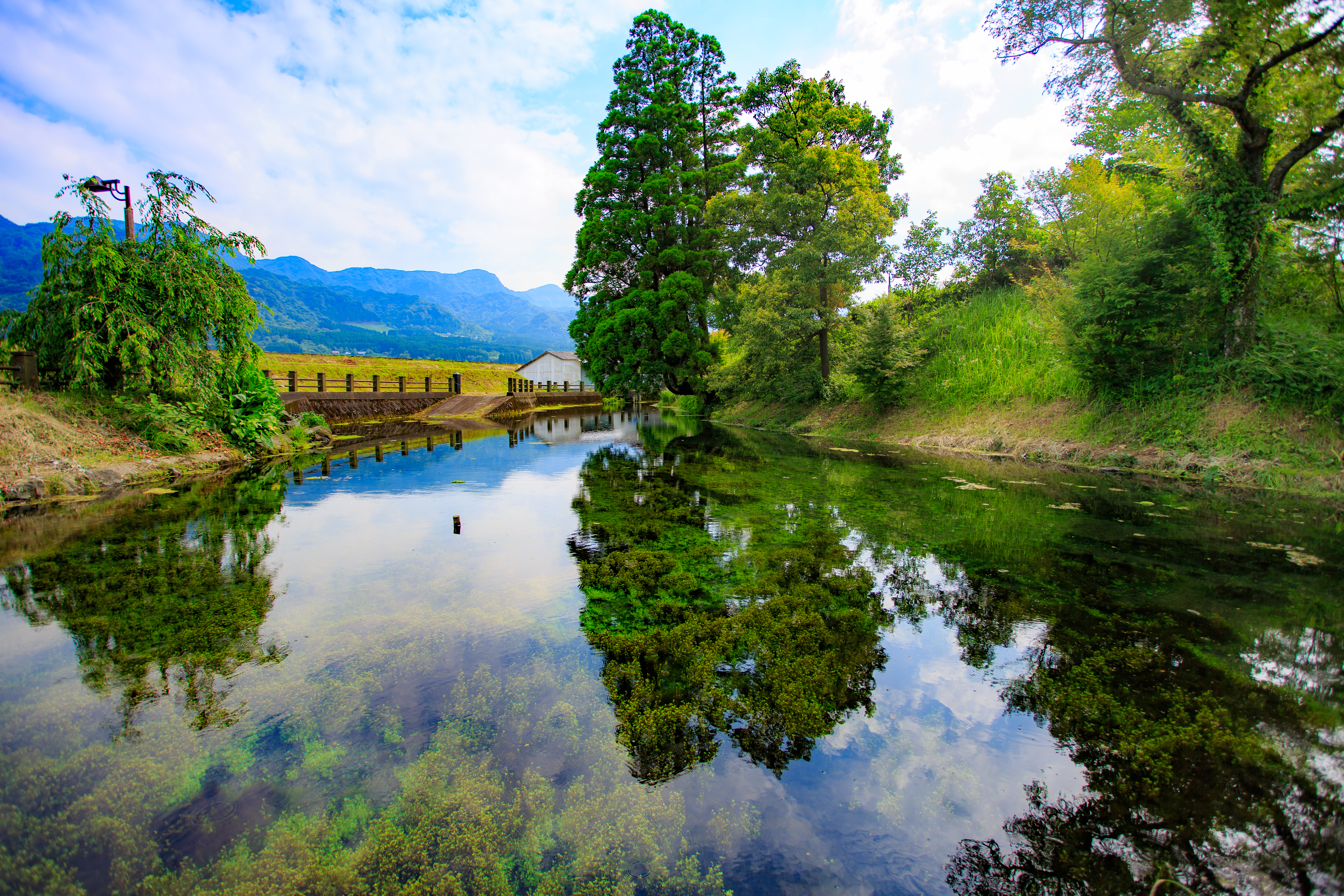 平成の名水百選 小池水源 2019/9/7撮影